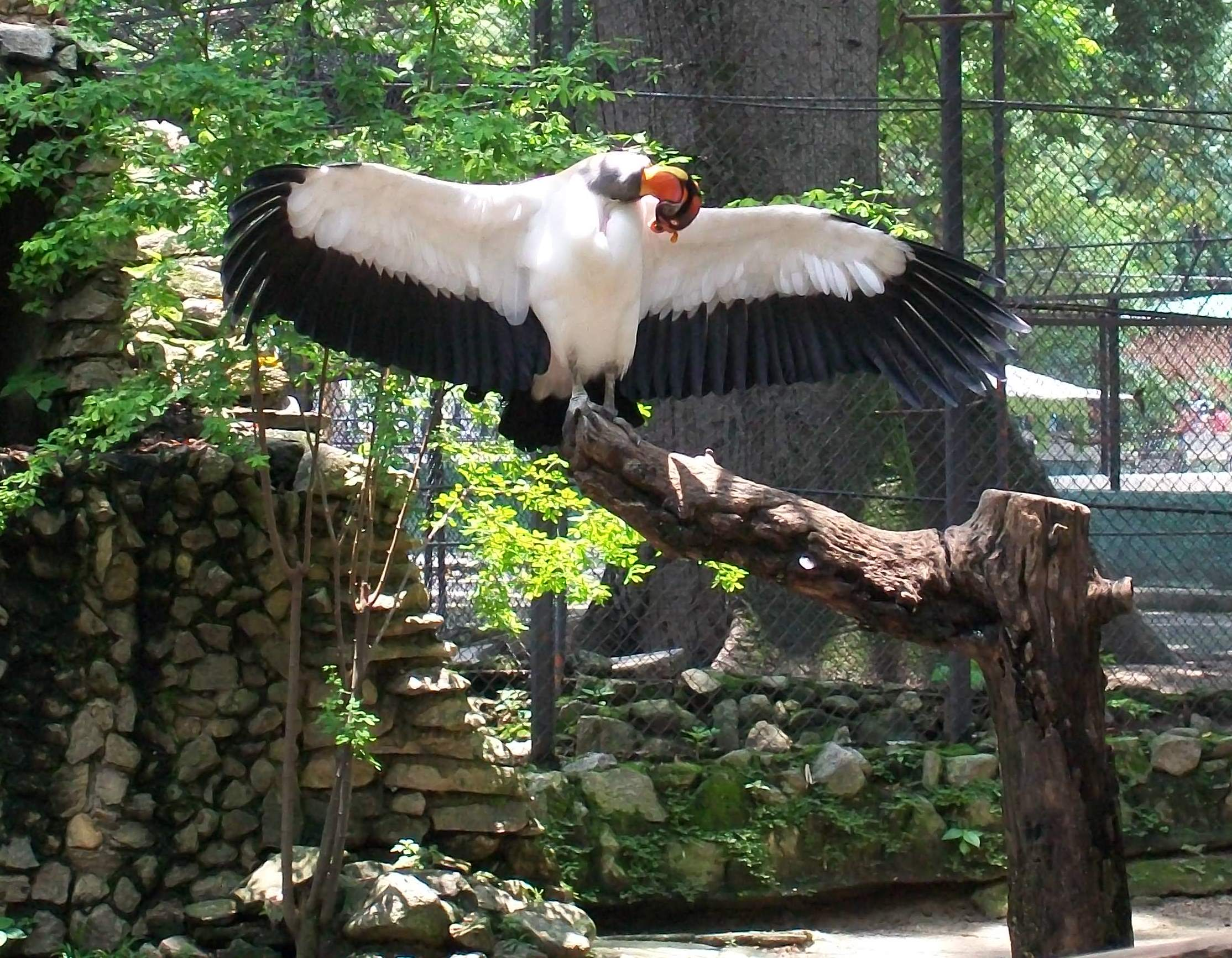 Zamuro Rey en cautiverio, Zoológico Las Delicias, Venezuela.